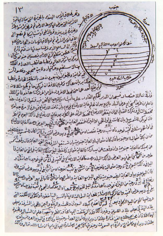 Abdurrahman Aktepe'nin astronomi kitabindan